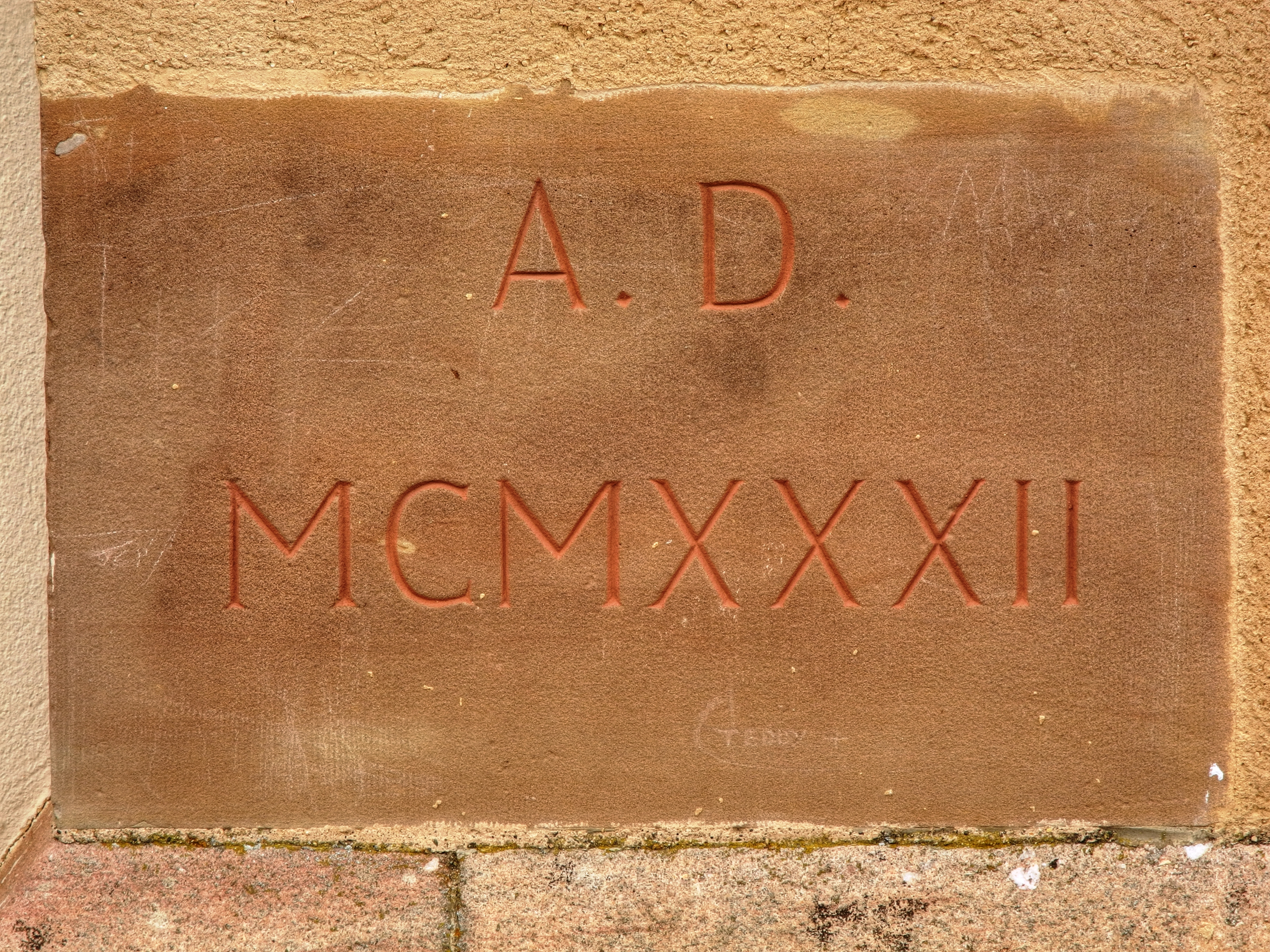 Basilique de Thierenbach : date en numération romaine (HDR).